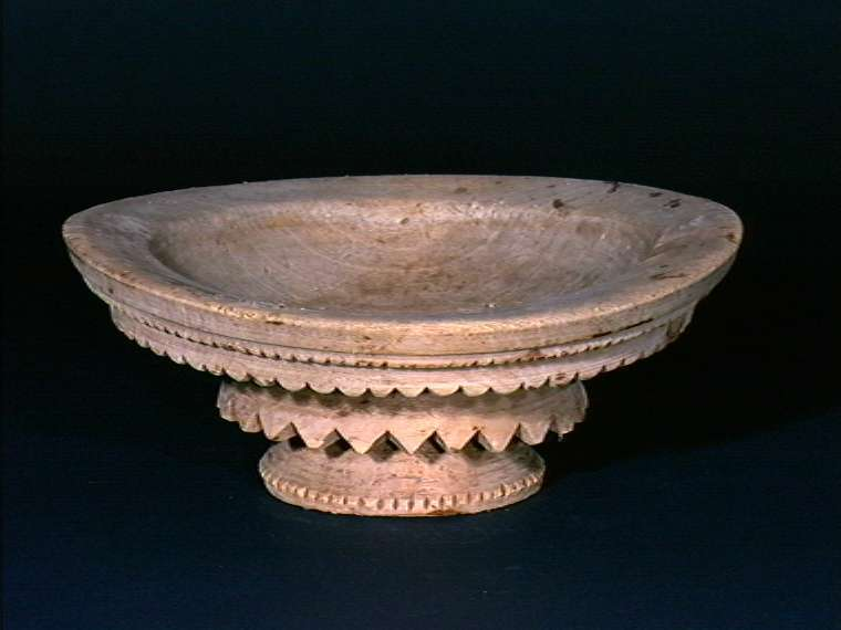 Ostefat i bjørk fra Lyngdal i Vest-Agder. Foto Anne-Lise Reinsfelt / Norsk Folkemuseum, NF.1898-0448.